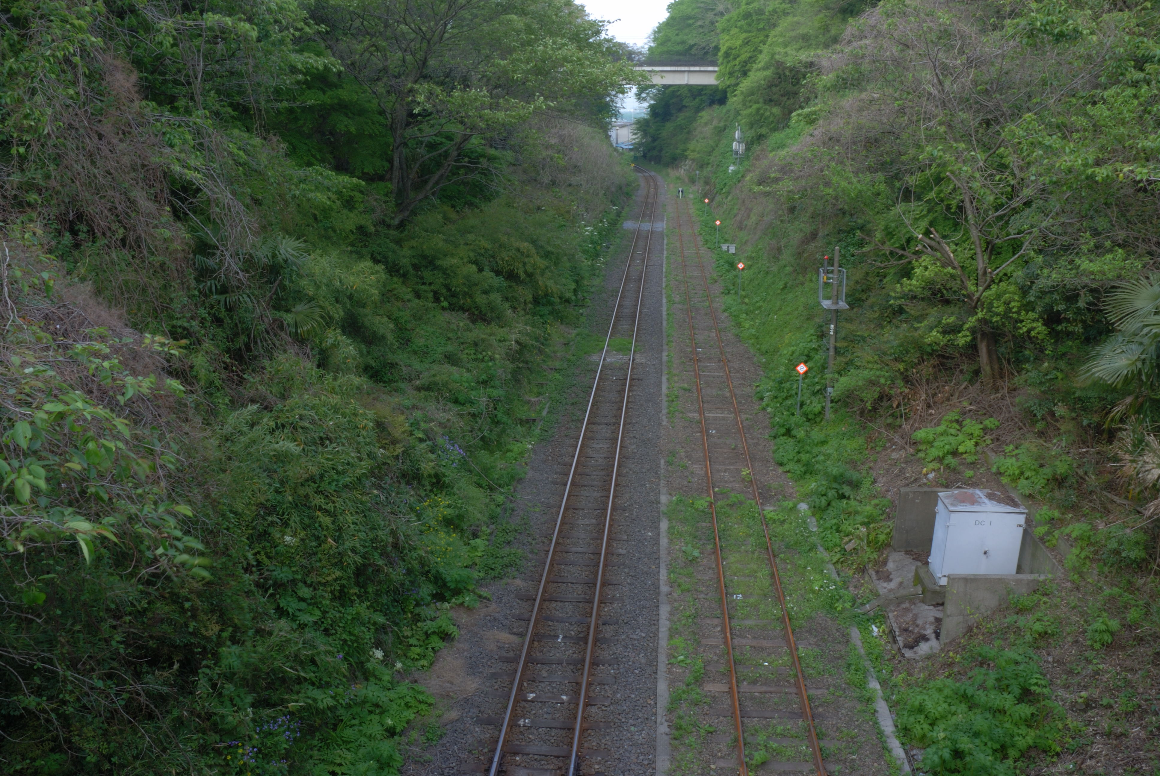 Honmaru karabori